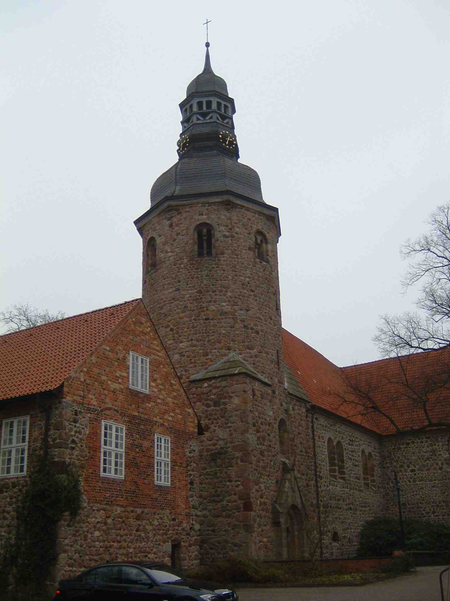 St. Viti Church in Zeven, Germany